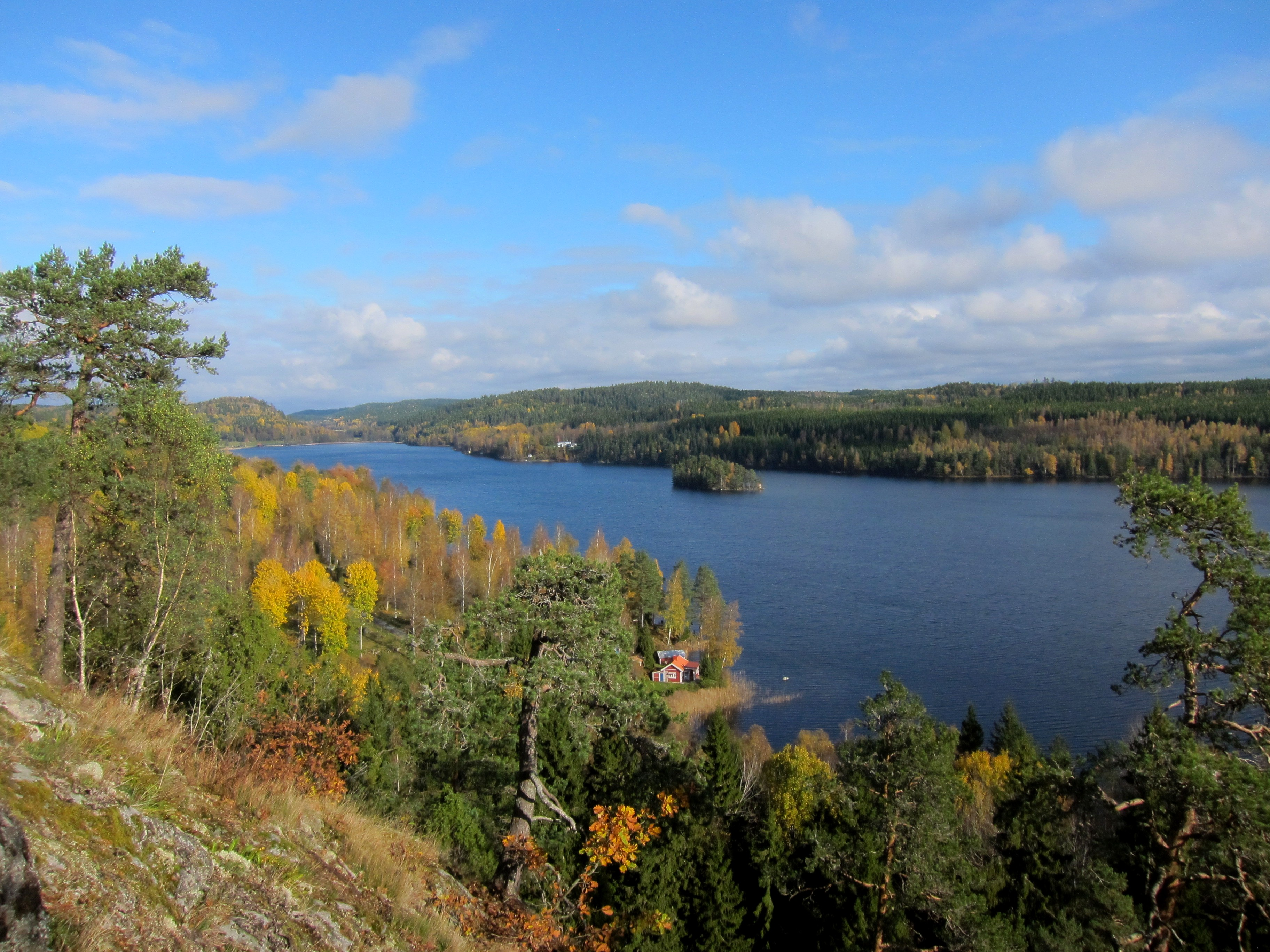 Ramsjön (Svarttorps socken, Småland)